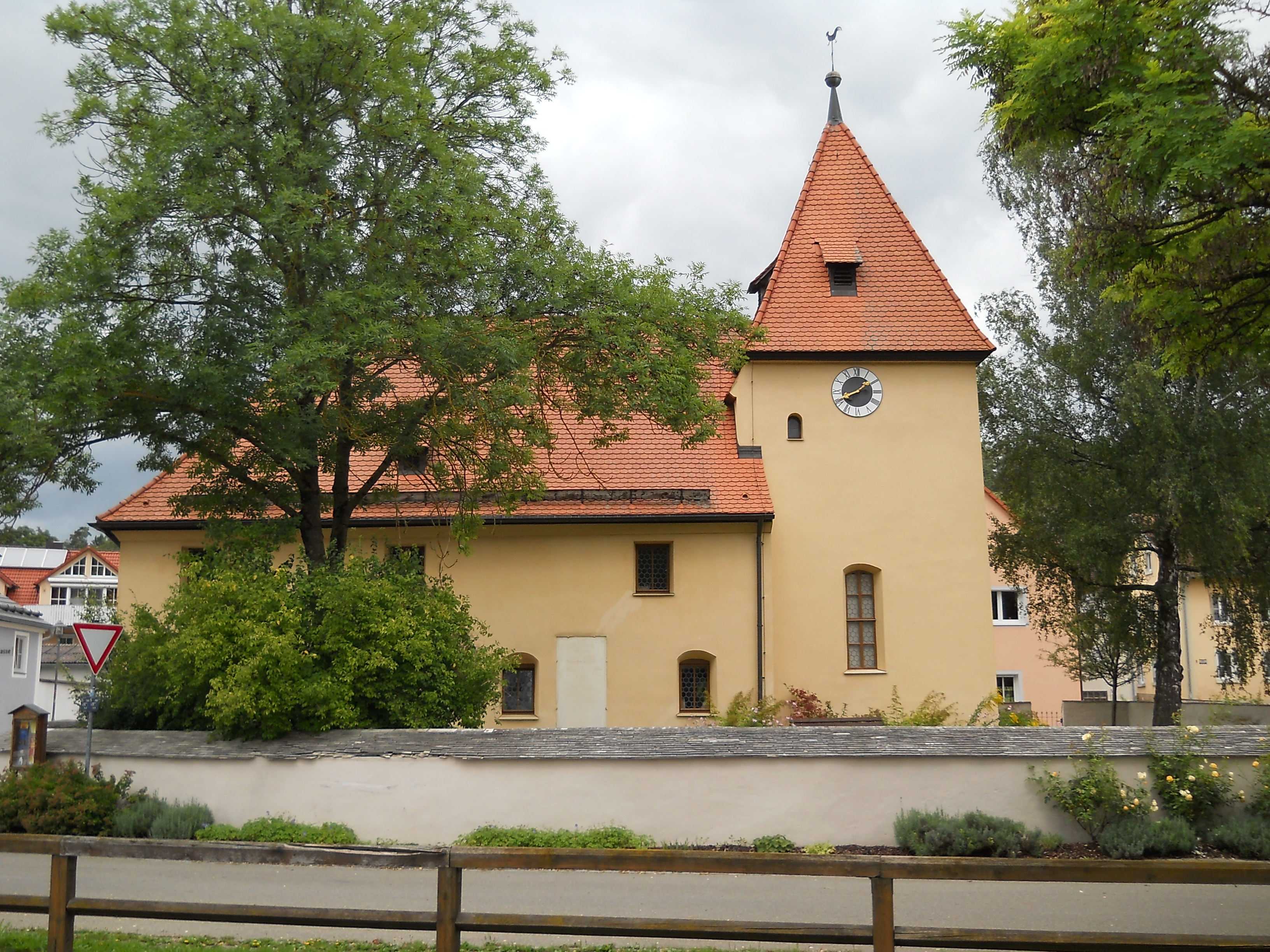 Schambach, Ortsteil von Treuchtlingen im mittelfränkischen Landkreis Weißenburg-Gunzenhausen, evang.-luth. Willibaldskirche